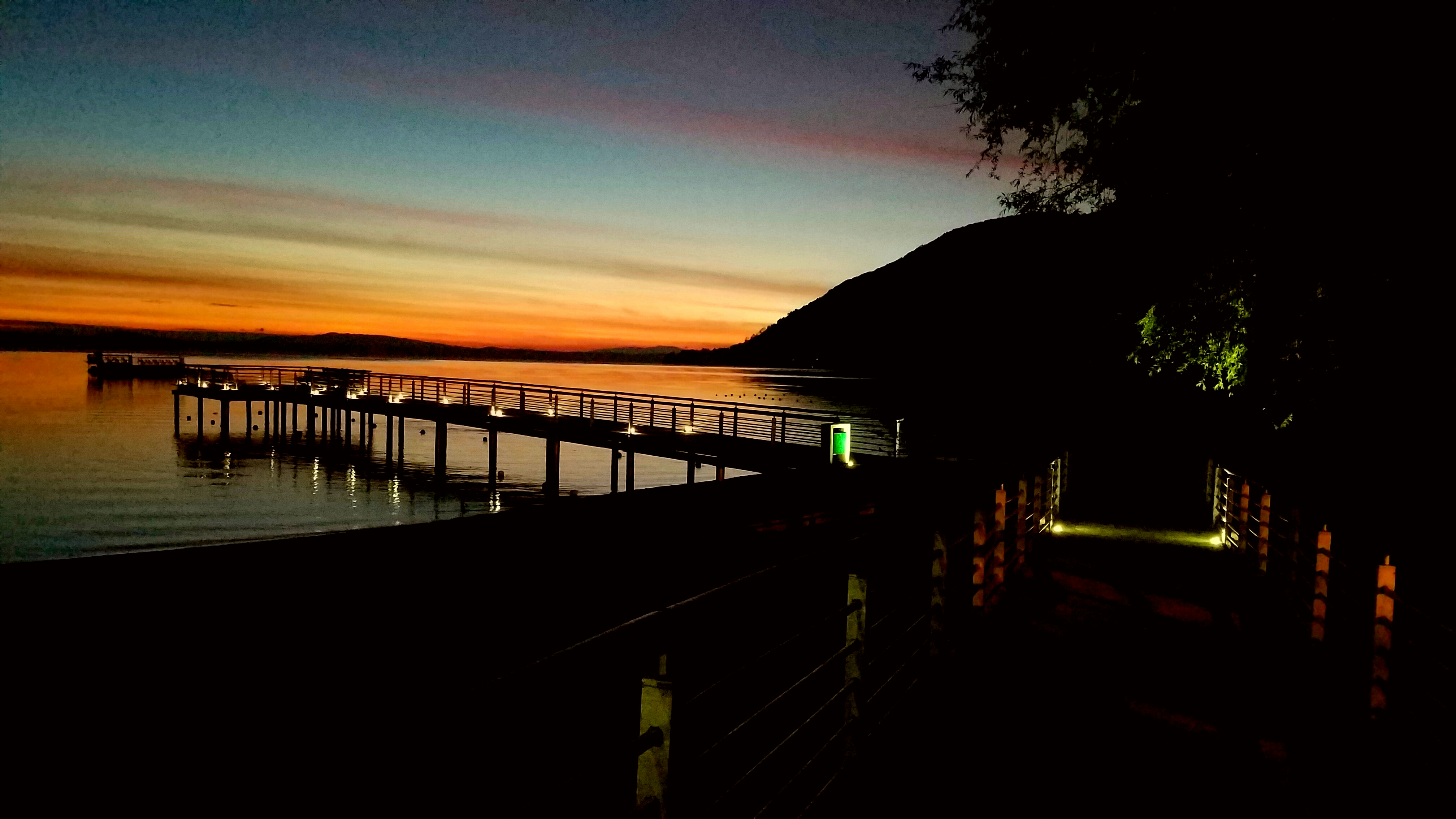 Vista del lago calafquen en un atardecer de verano.